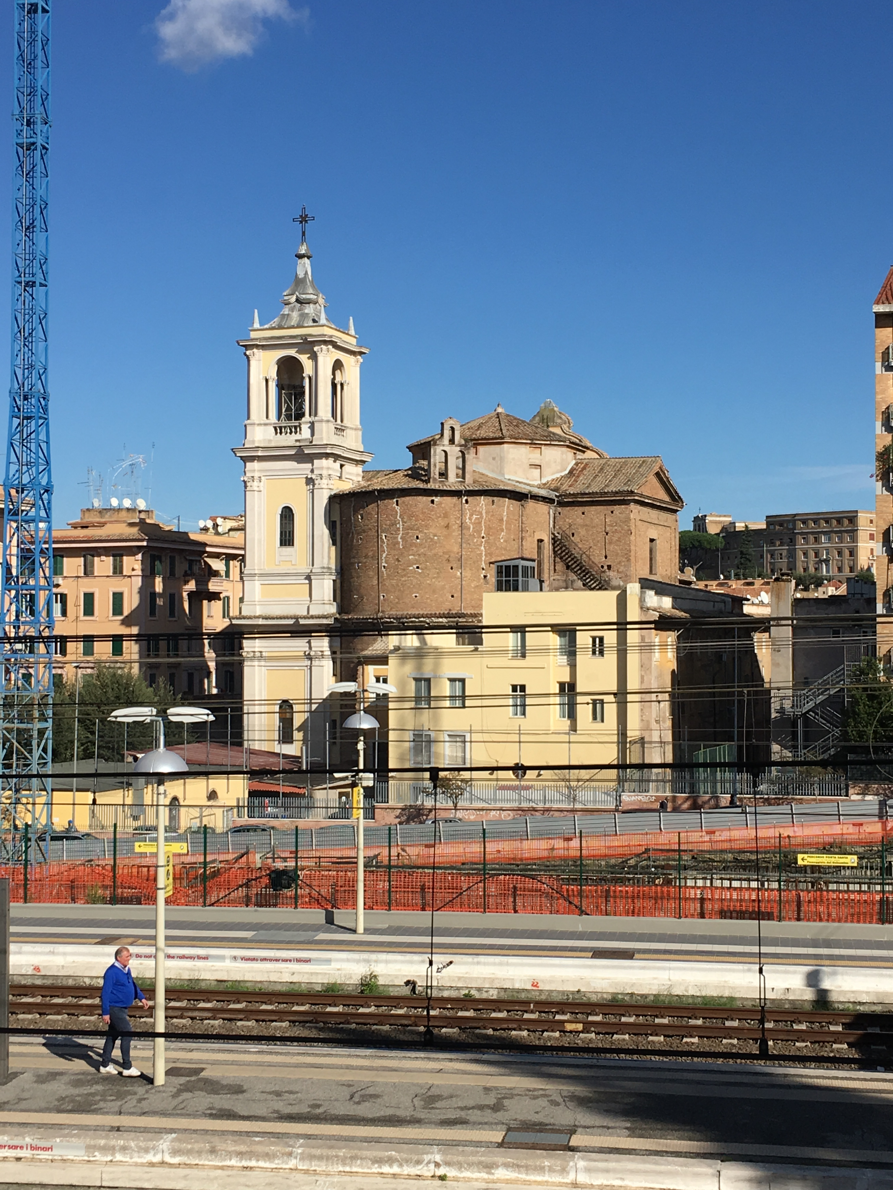 Parrocchia Santa Maria delle Grazie alle Fornaci vista da dietro la stazione di S. Pietro